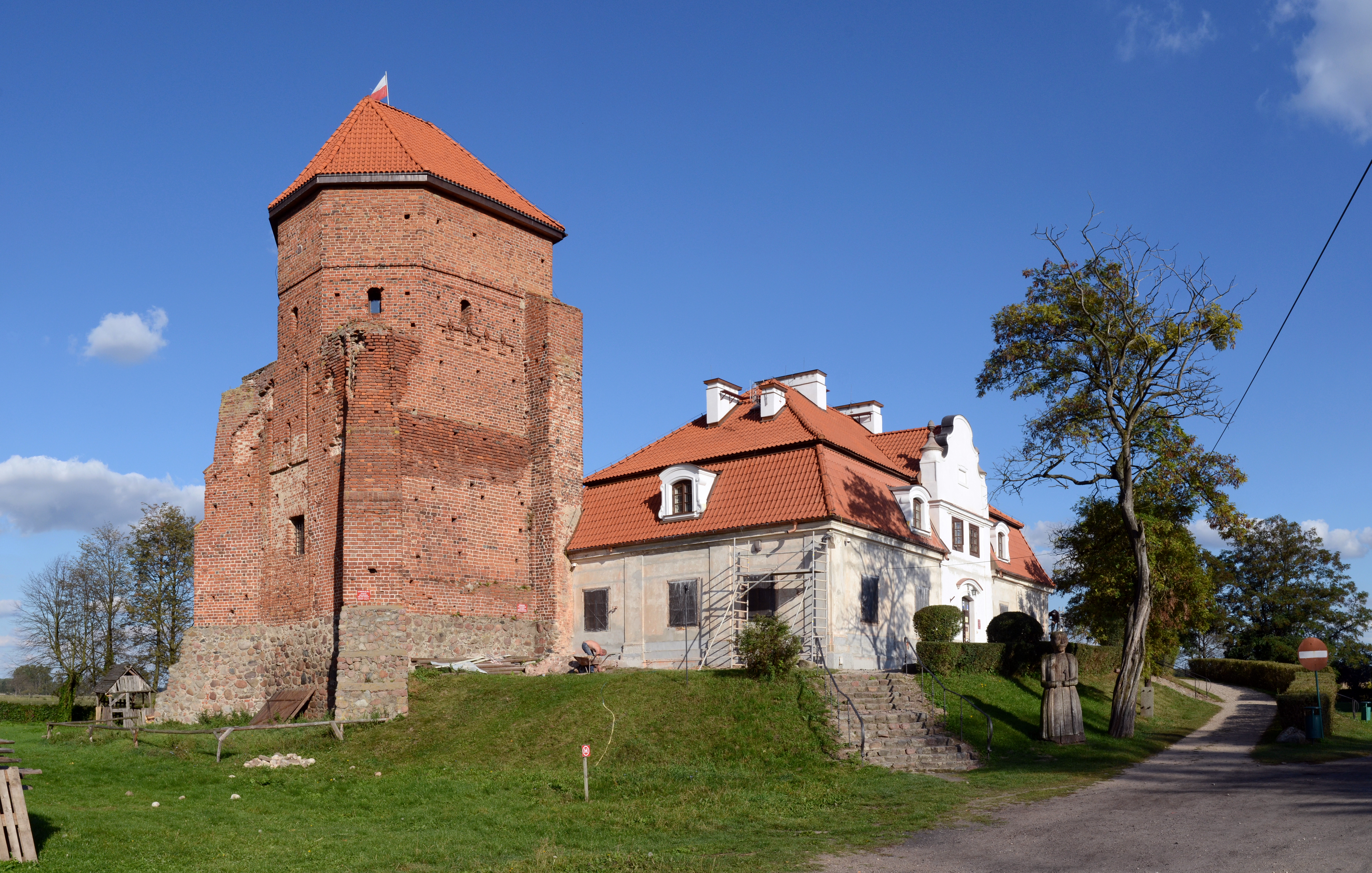 Zamek w Liwie podczas renowacji w 2012 r.